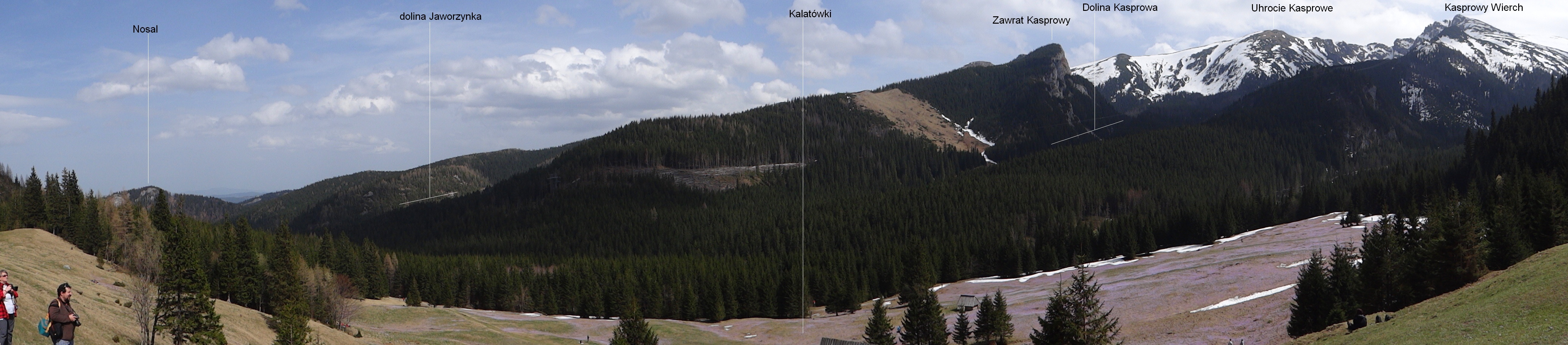 Panorama z polany Kalatówki